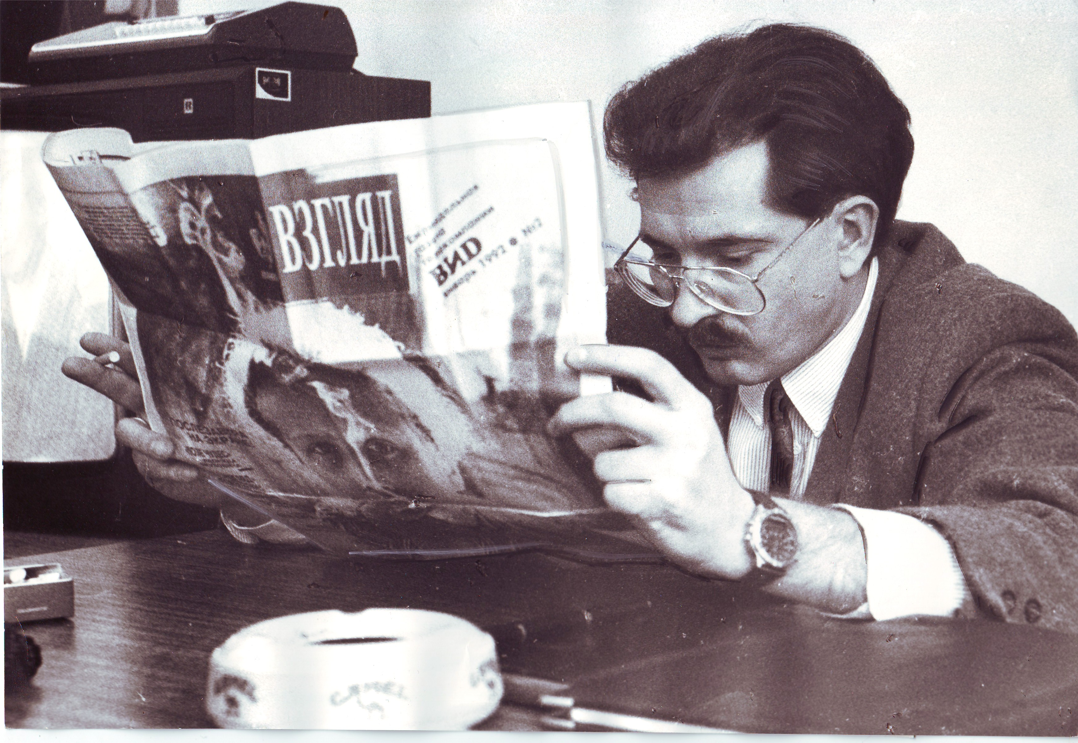 Vlad Listiev reading Novy Vzglyad weekly